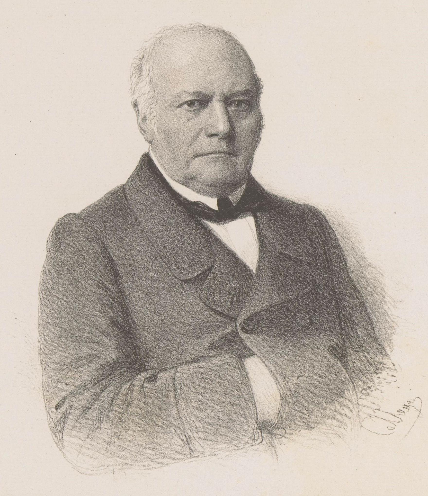 Albert Goblet d'Alviella, Premier ministre belge